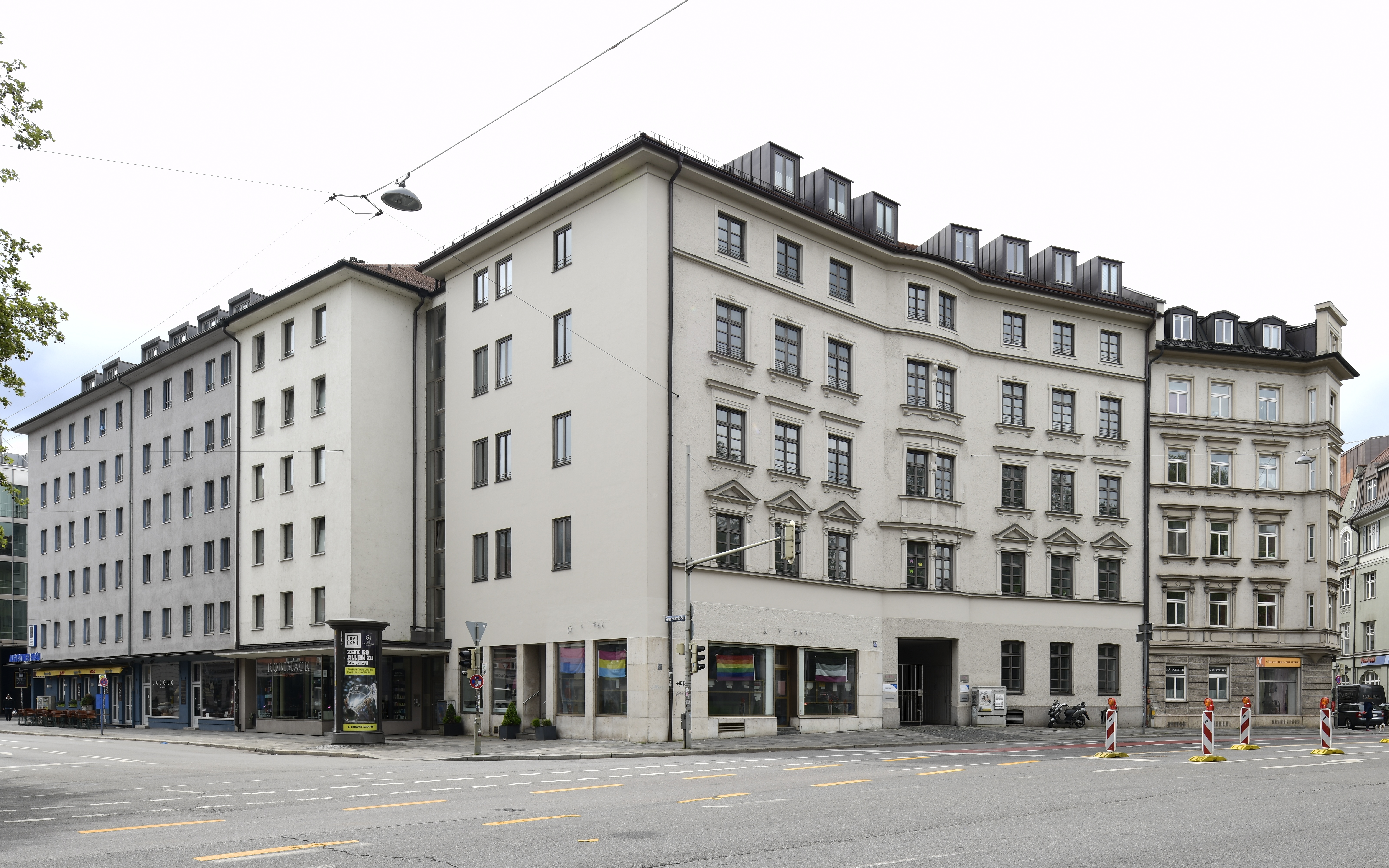 München, Fassadenansicht Blumenstraße 29, Bildmitte, an der Ecke mit der Papa-Schmid-Straße. Das Gebäude hatte bauzeitlich eine geschlossene Fassadenverbindung von der Angertorstraße, und den Gebäuden Blumenstraße 27 bis 19 an der Theklastraße. Eine Anbindung zur Müllerstraße und weiter zur Fraunhoferstraße, in Form der Papa-Schmid-Straße, erst im Jahr 1949 bis 1950 angelegt und benannt, gab es zuvor nicht. Für das Gebäude ist für die Zeit ab 1924 bis 1936 ein Kino im Innenhofgebäude, nicht erhalten, ausgewiesen. Das Kino trug den Namen Film-Palast. Zugang auch über das nicht mehr existiernde Gebäude Müllerstraße 32. Das Kino war in den Jahren 1892 durch den Architekten Wilhelm Borchert als Theaterbau, Innenarchitekt Robert Geo Wiesengrund [1],[2] , errichtet worden. Dieses hatte die Bezeichnung Blumen-Säle. Haupteingang wie auf der Bildmitte zu sehen, diente das noch erhaltene Eingangsportal. Über dem Portal prankten jeweils zur linken und rechten Seite die Aufschriften Blumen-Säle. Von 2004 bis 2014 war im Eck zur Papa-Schmid-Straße hin ein Kaffee eingerichtet. Die Aufschrift des ehemaligen Cafes am Hochaus, im Erdgeschoss des Hauses, wurde 2018 abgebaut. Zustand März 2019. An der Fassade sind seit Sommer 2019 wieder die Cafe-Tafeln angebracht. Das Diversity Café München